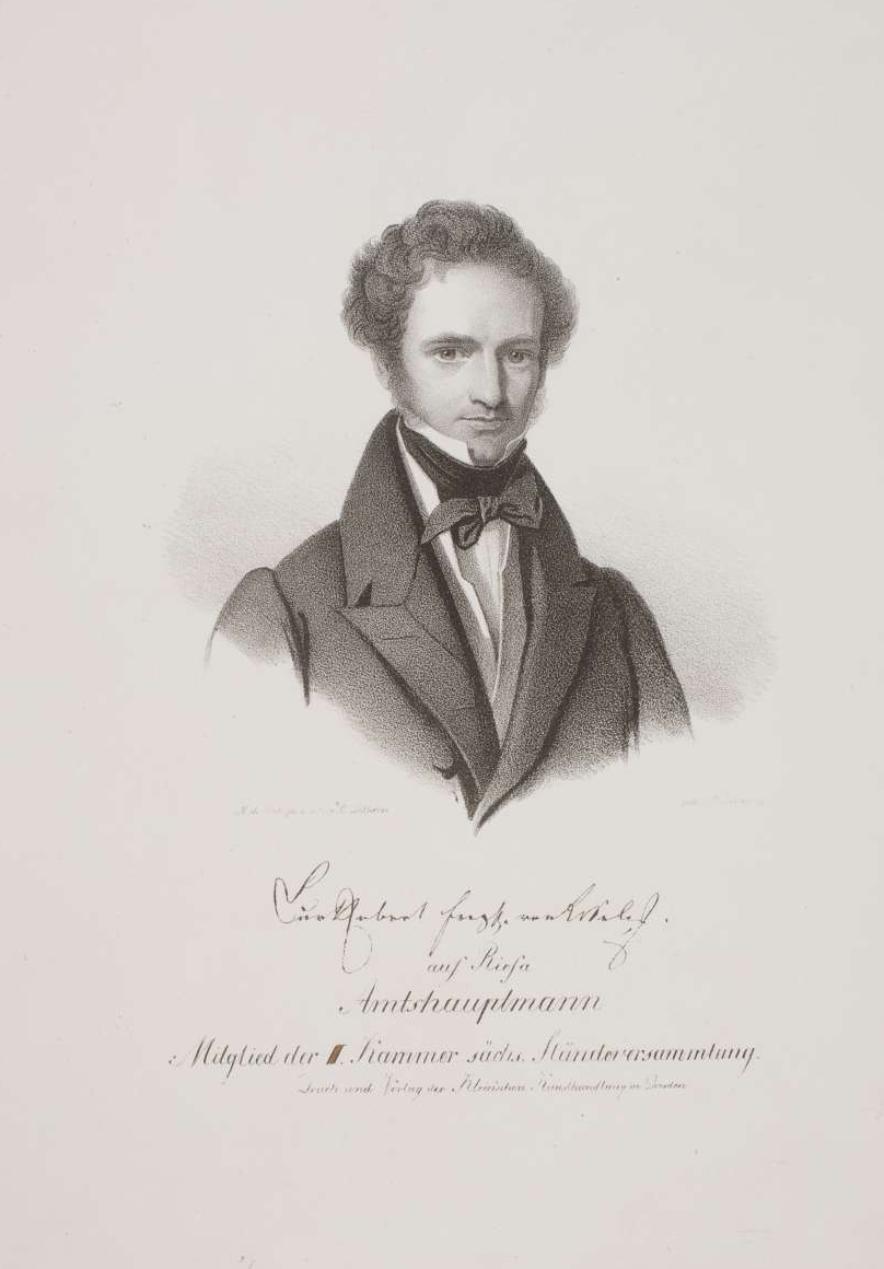 Gutsherr auf Riesa; kgl. sächs. Amtshauptmann u. Mitglied der Ersten Kammer der sächs. Ständeversammlung 1833/34, 1798-1866